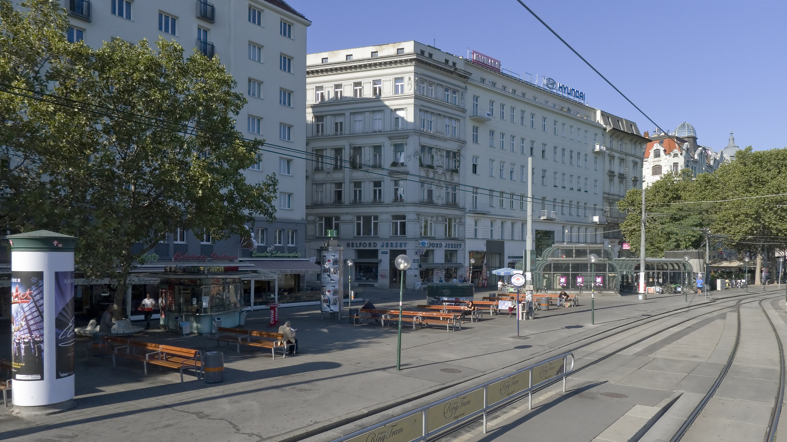 Schwedenplatz in Wien 1 Richtung Westen